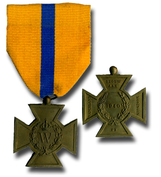 Bronzen Kruis 1940 origineel Spink